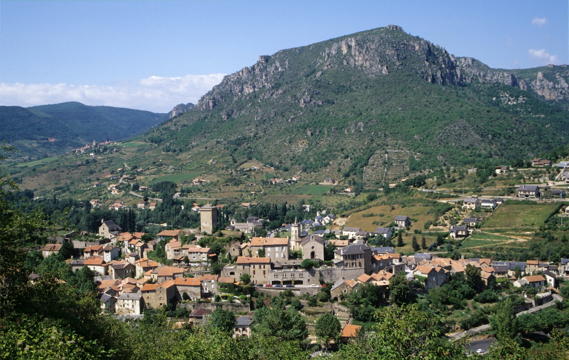 Au premier plan, le bourg de Peyreleau (Aveyron) masquant en grande partie au second plan et en contrebas le bourg du Rozier (Lozère), France.